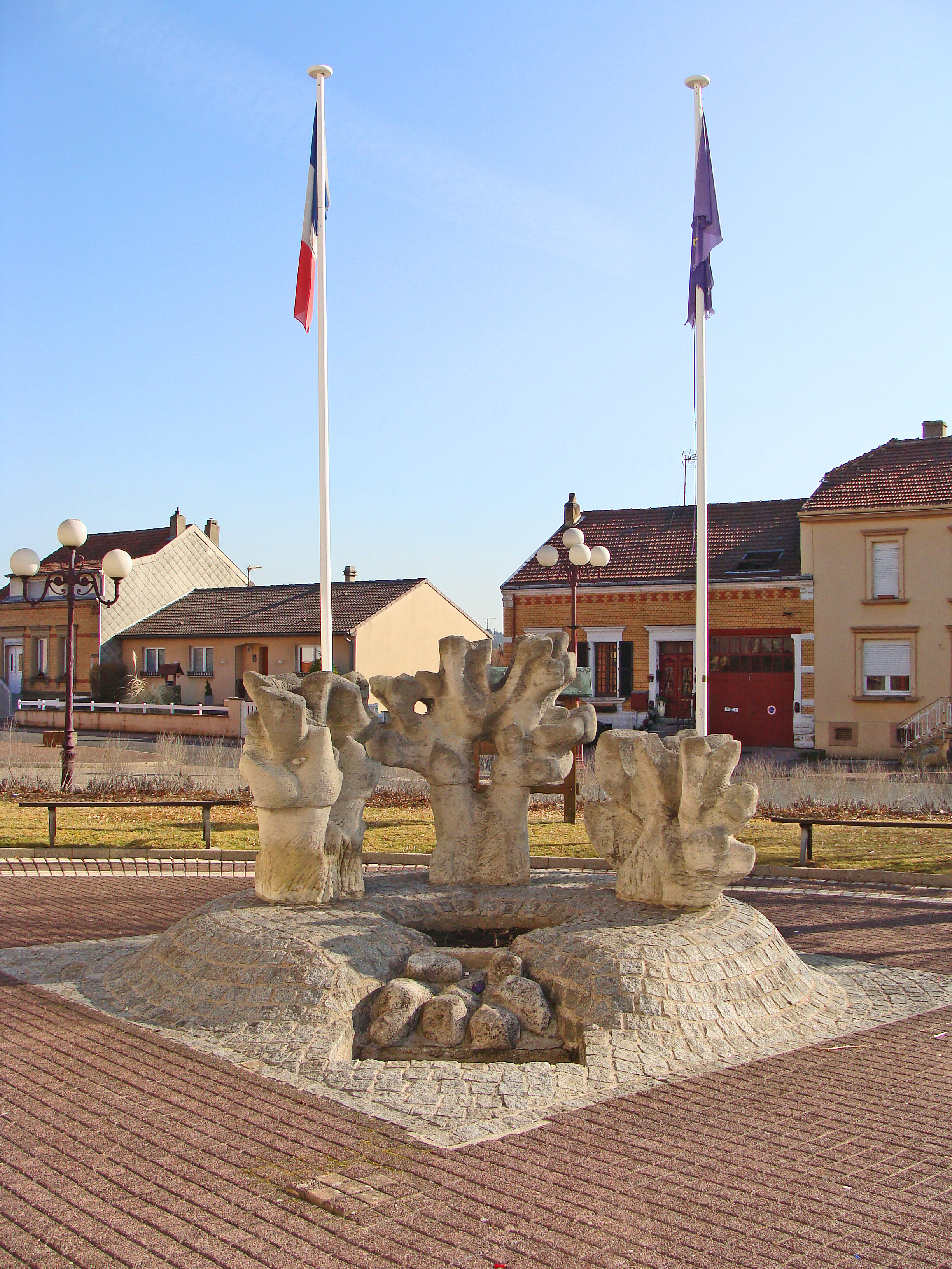 L'Hôpital (Moselle). Place de la Mairie et fontaine.